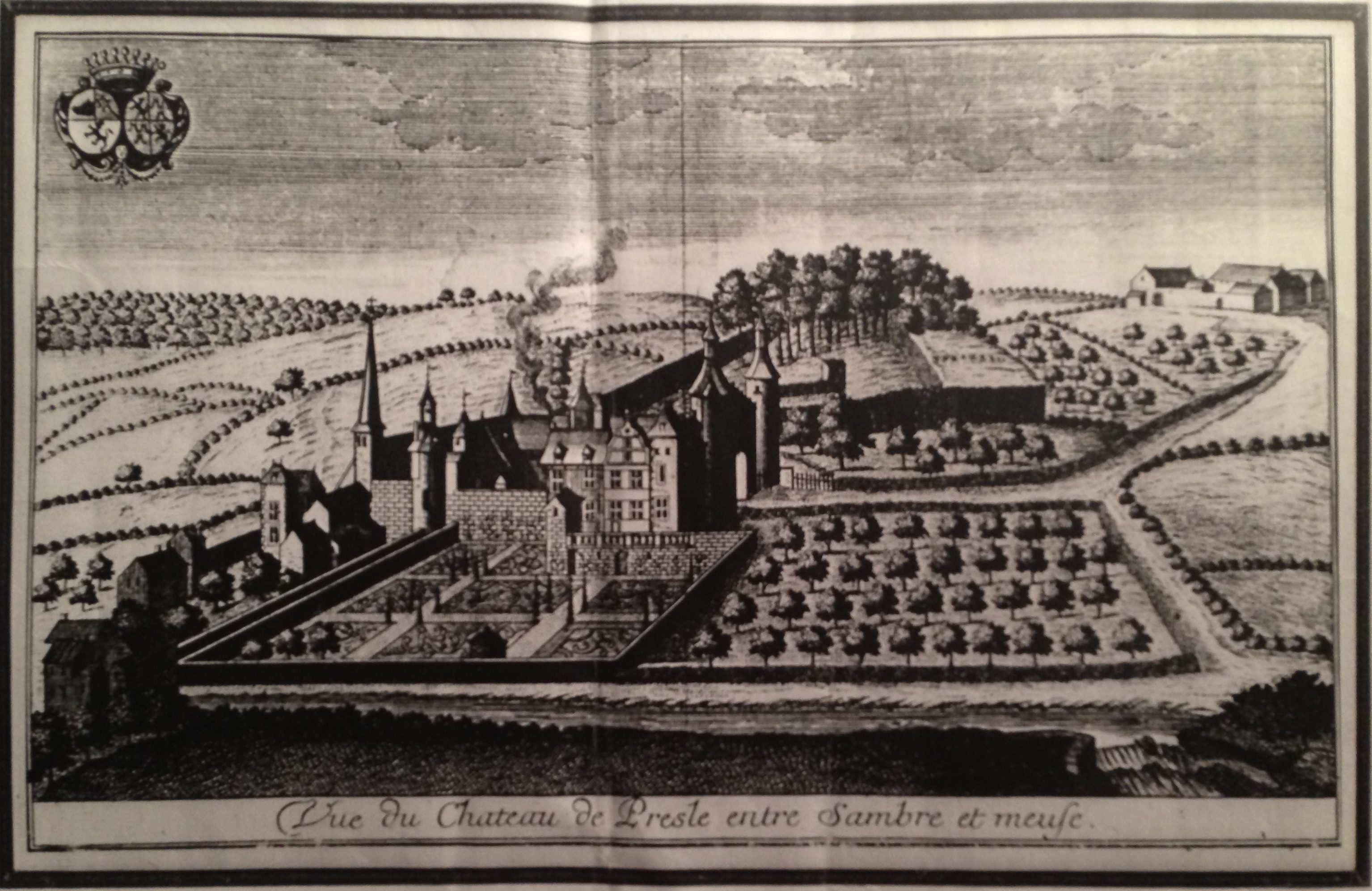 Château de Presle et ses dépendances au XVIIIème siècle. Les armes du couple Lierneux-Roly, propriétaire du château, apparaissent dans le coin supérieur gauche. Le château fut reconstruit en 1851.